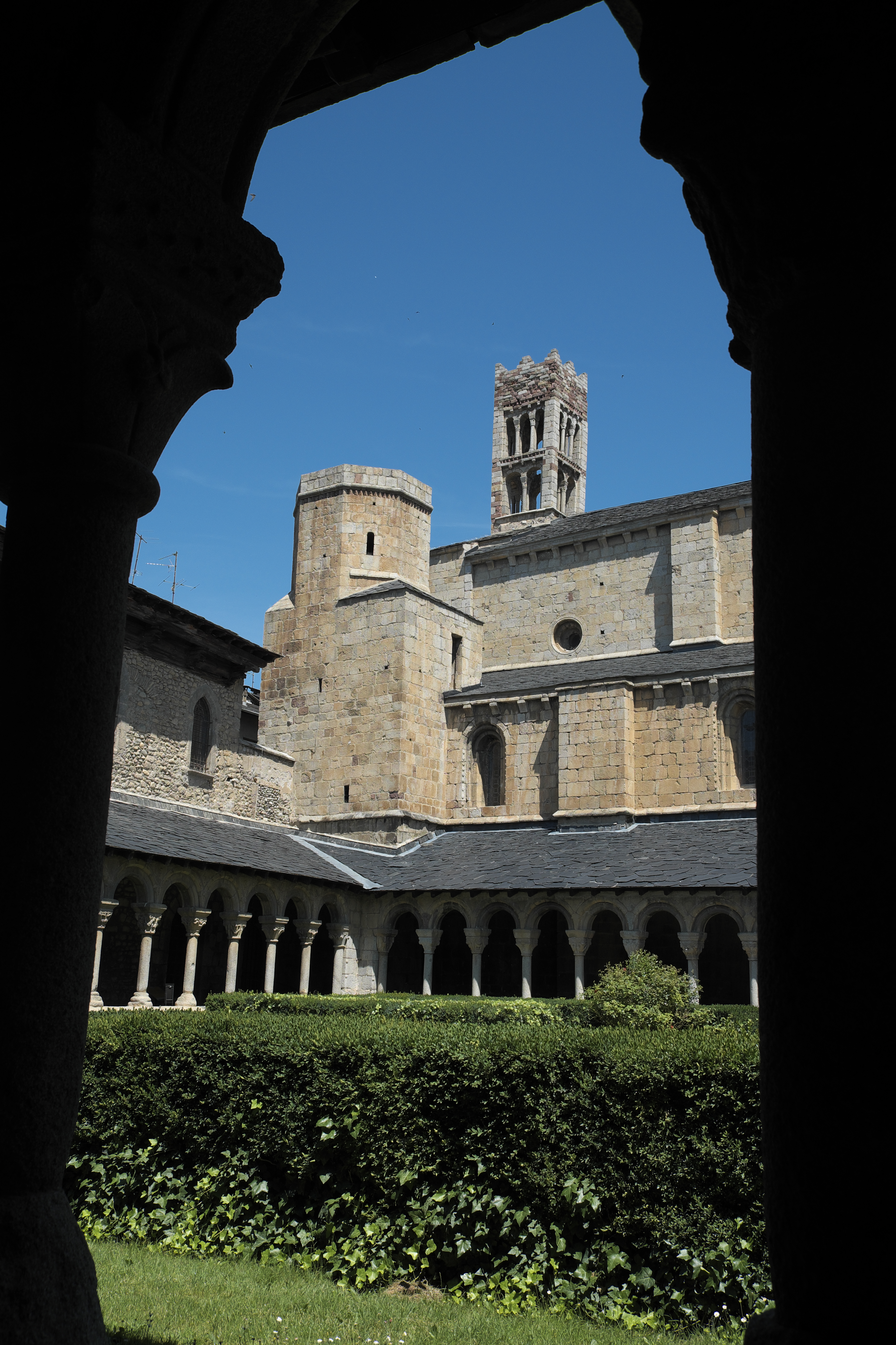 Kreuzgang der Kathedrale Santa María in La Seu d’Urgell in der Provinz Lleida (Katalonien/Spanien)